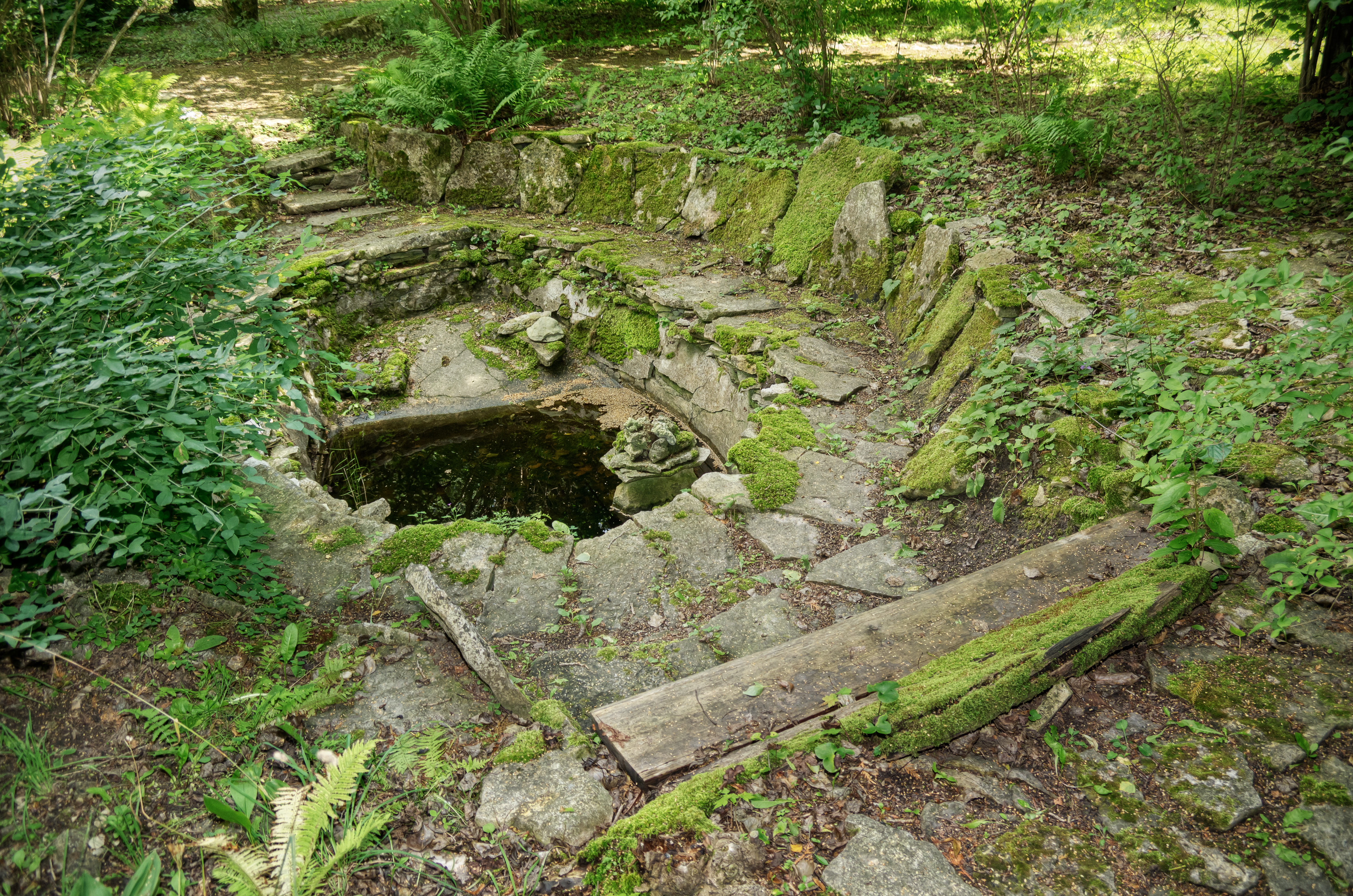 Mihkel Ranna dendraarium Saaremaal. Bassein.